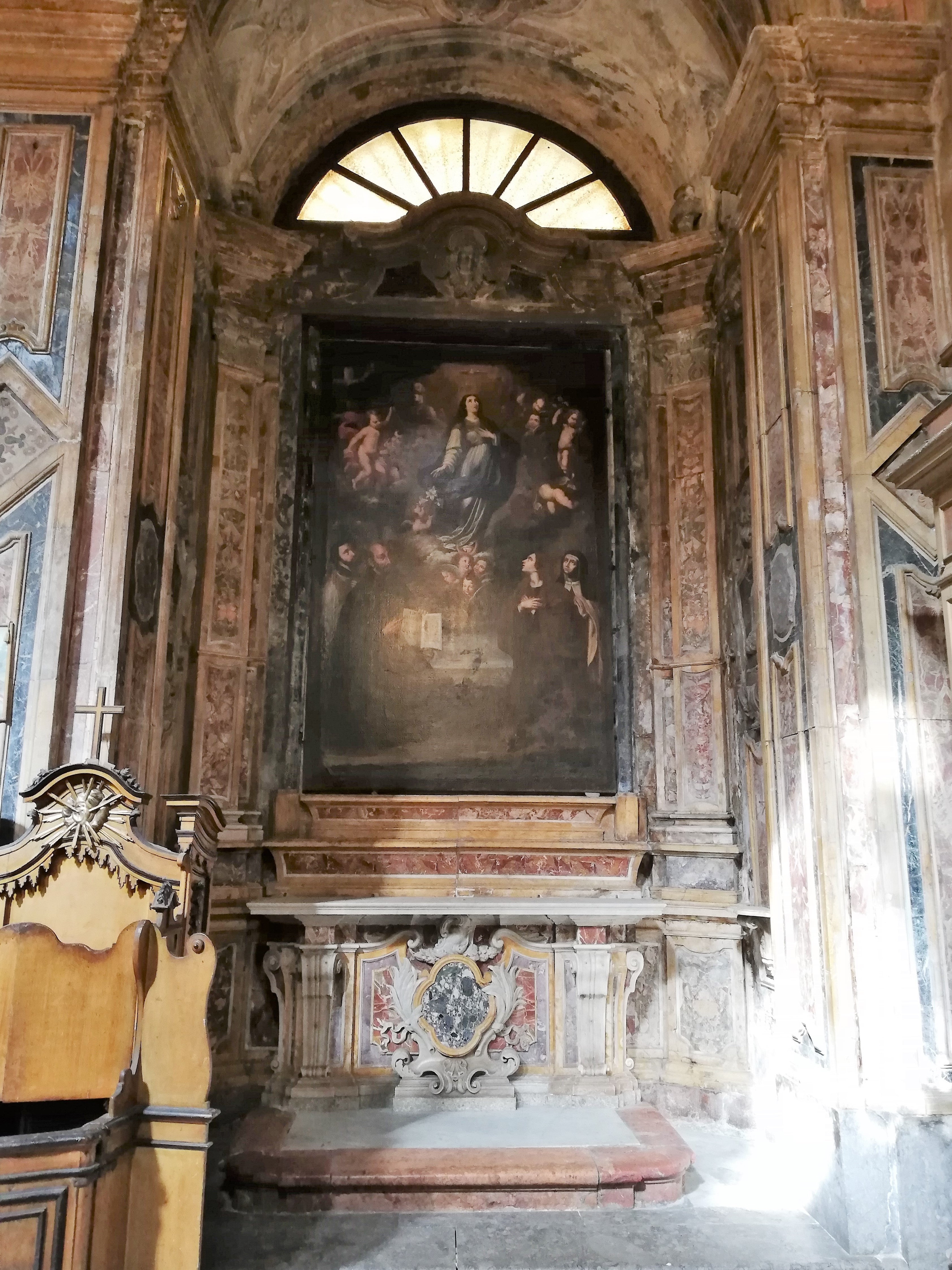 Prima cappella destra.